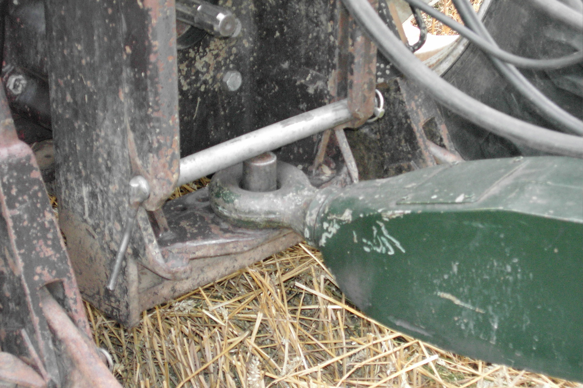 Piton-Fix-Anhängung an einem NewHolland Traktor, Untenanhängung, ist keine Hitch, ist keine K80